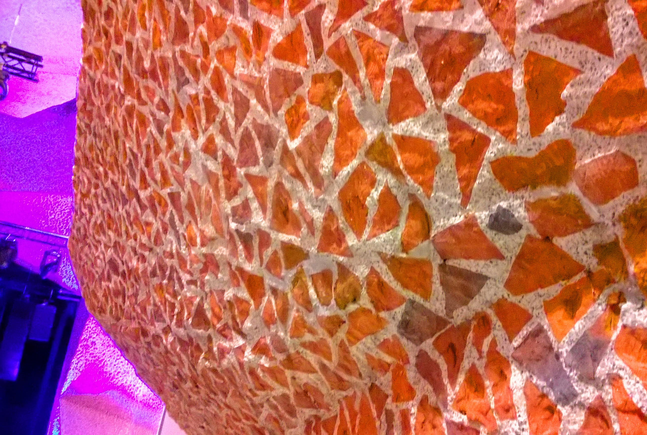 Centrum Kulturalno-Kongresowe Jordanki, pikado